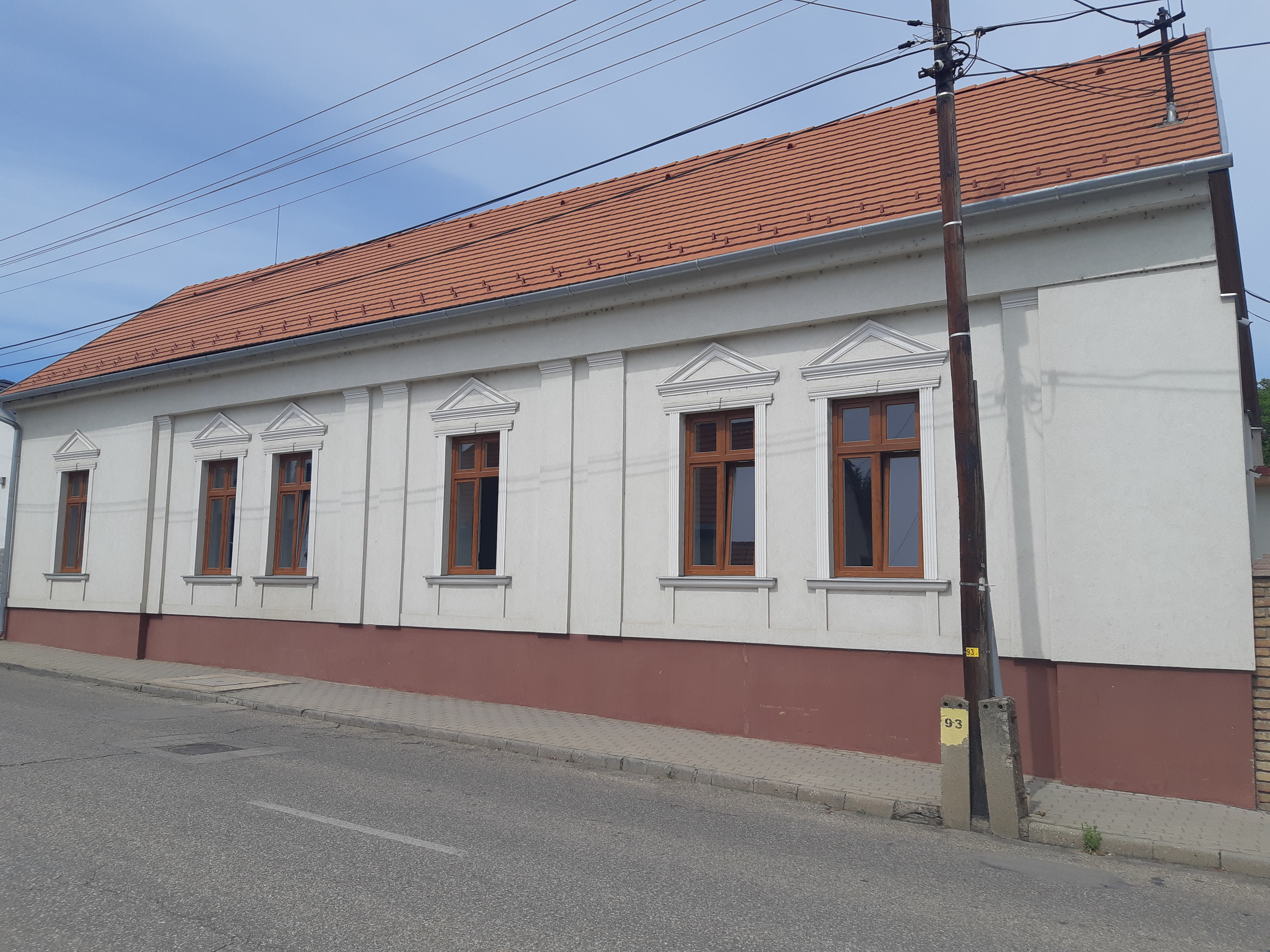 A Bonyhádi Petőfi Sándor Evangélikus Gimnázium régi épületének homlokzata a Bajcsy-Zsilinszky utca felől. Az eredeti épület jóval nagyobb volt, a jelenlegi épület mindössze az egykori gimnázium bal szárnya, a jobb szárnyat és a középső bejáratot lebontották.